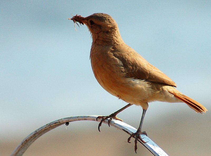 Praça Barão do Rio Branco, Serra Negra-SP